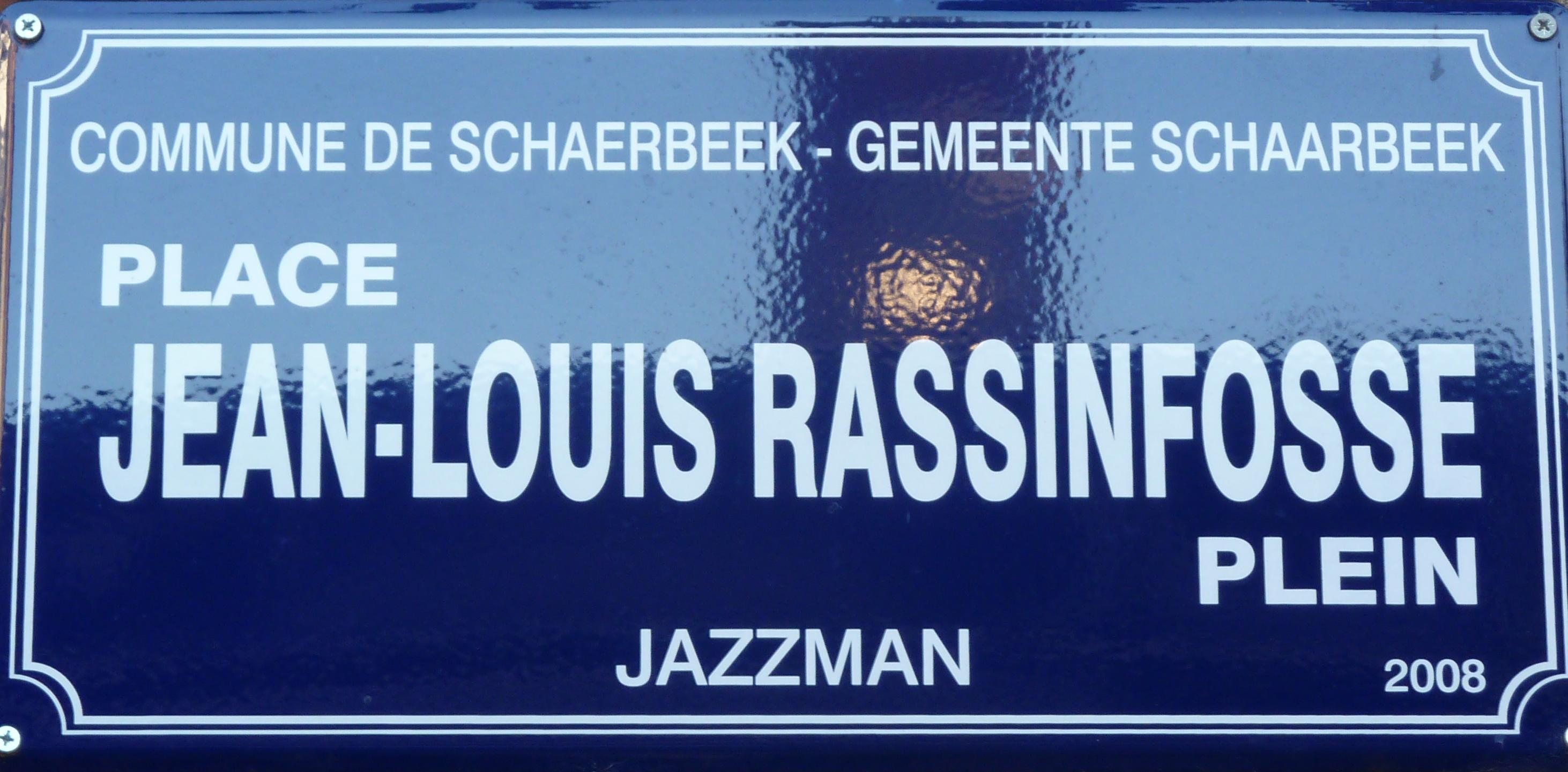 Le Mur des Célébrités à la Maison des Arts de Schaerbeek, Bruxelles, Belgique.